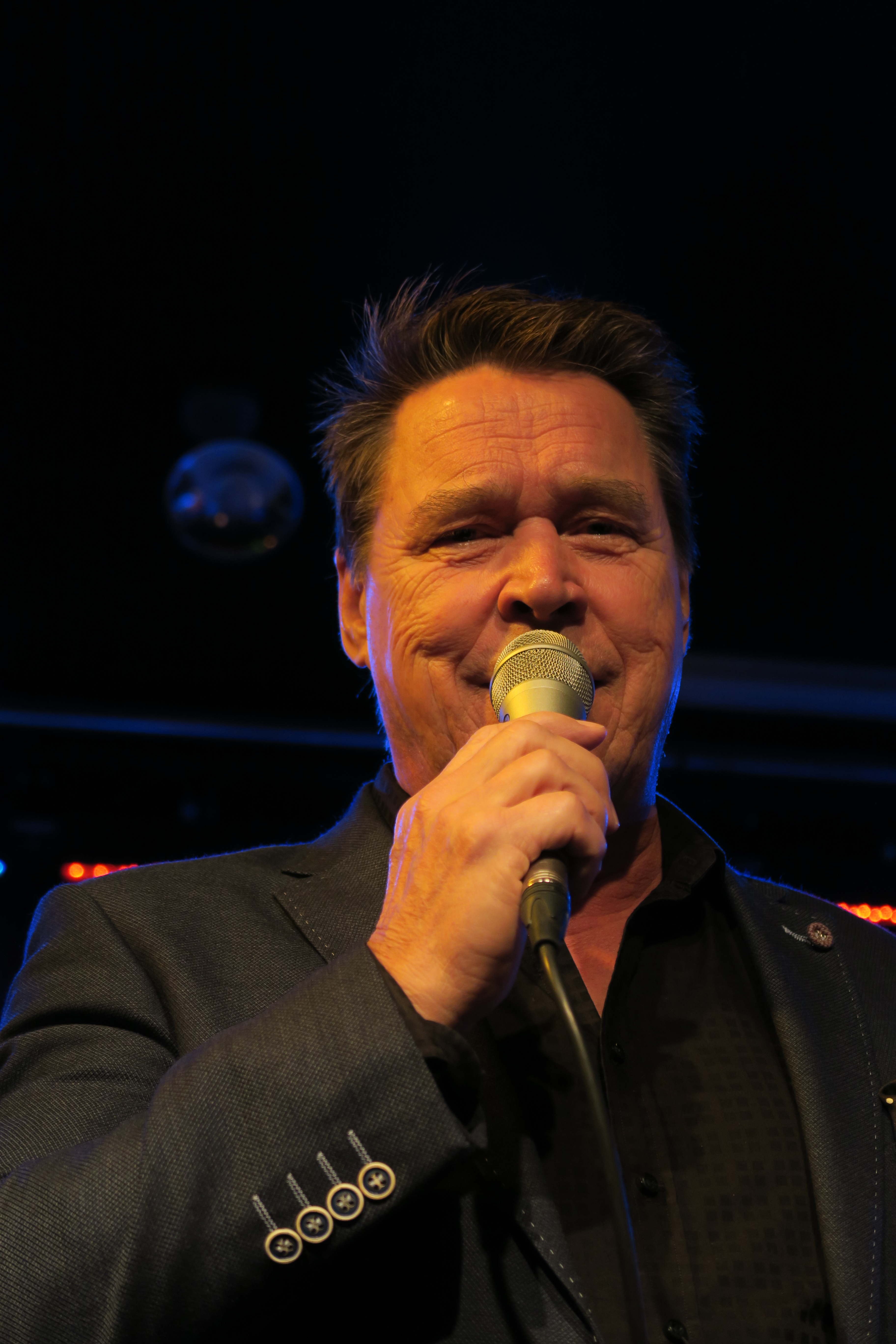 Markku Aro suomalainen laulaja